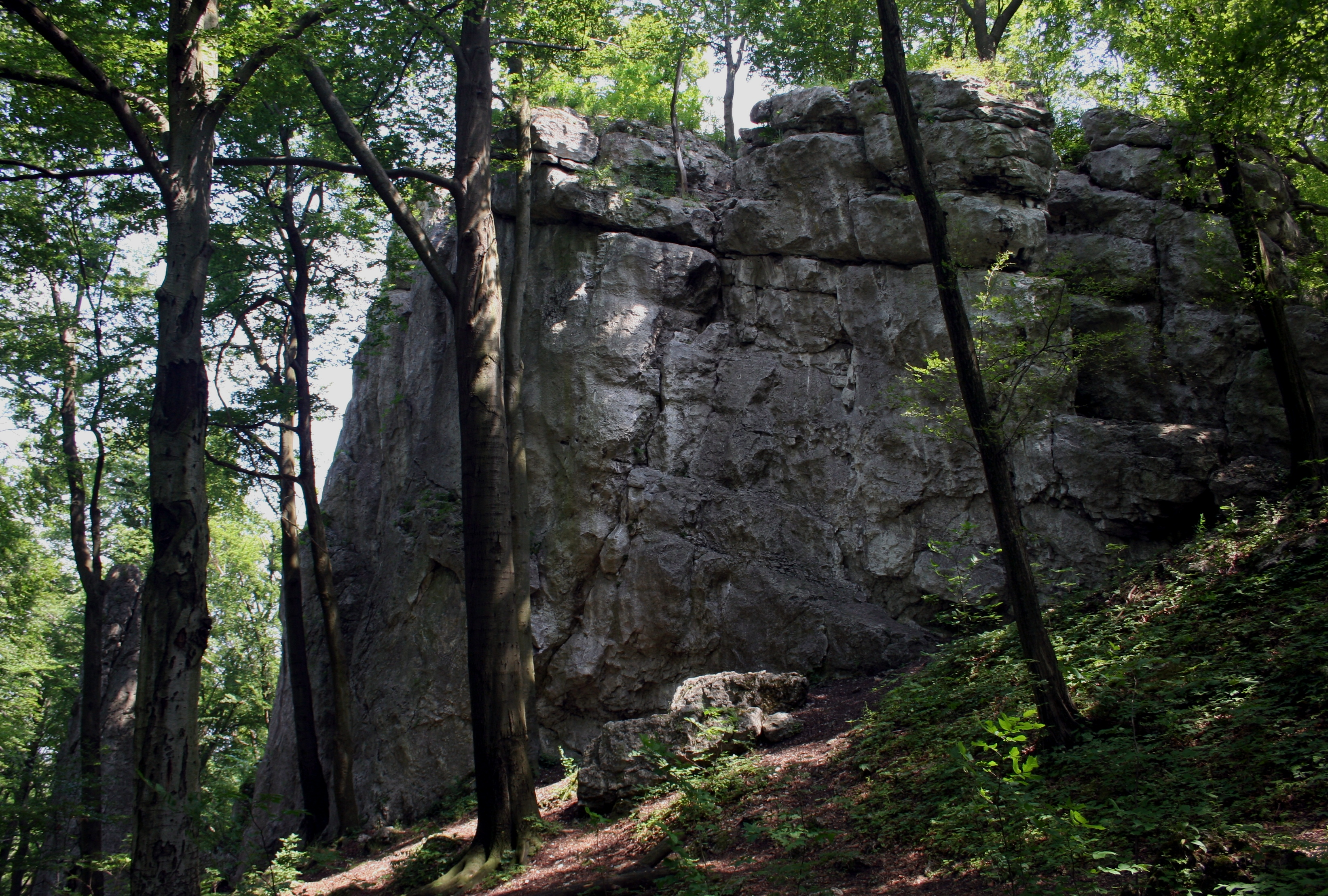 Skała w rezerwacie Zielona Góra, powiat częstochowski